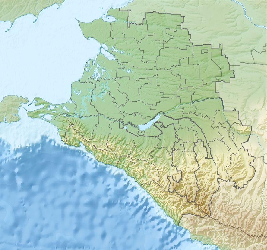 Физическая карта Краснодарского края, Россия. Координаты для GMT: -R36/42/43/47 Инструменты: GMT, Inkscape This map may be incomplete, and may contain errors. Don't rely solely on it for navigation.